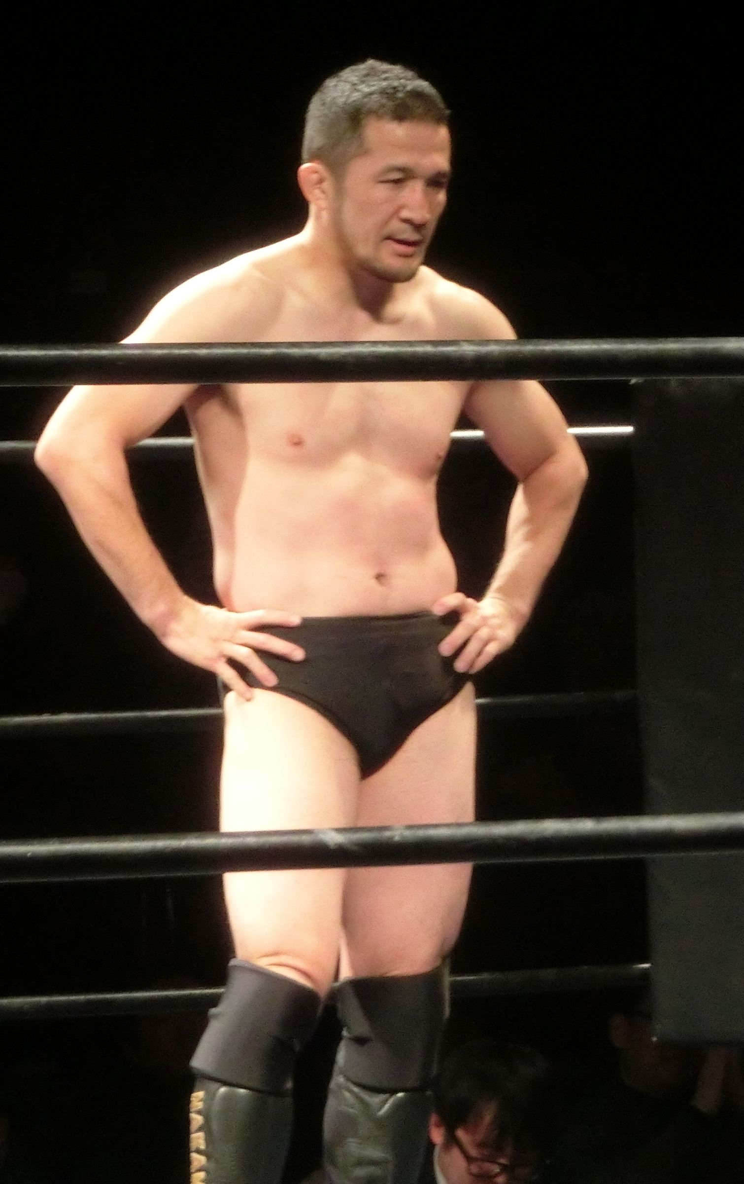 Daisuke Nakamura（夕月堂本舗）